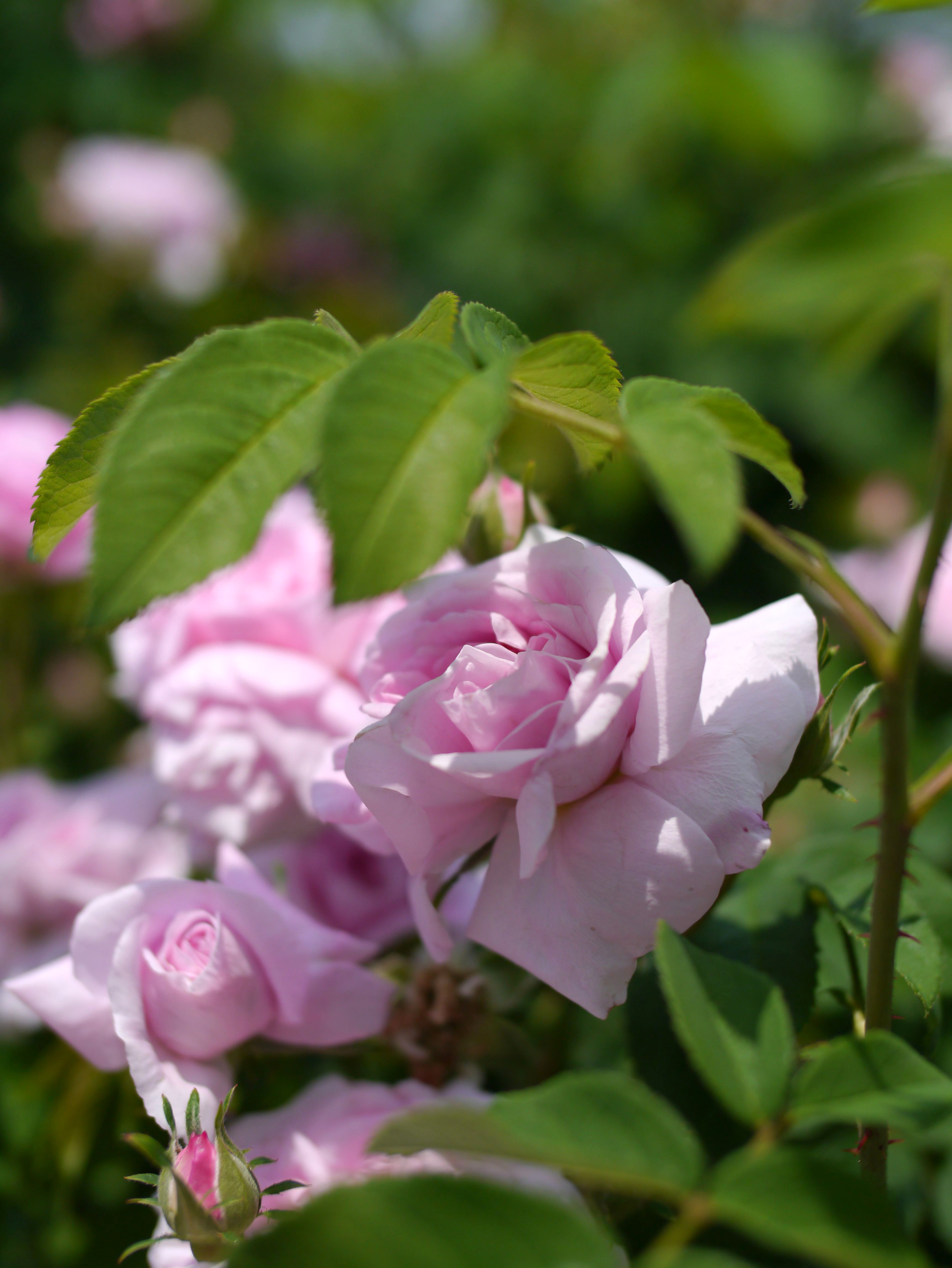 Rose, Ispahan, バラ, イスパハン, Old rose オールドローズ befor 1832